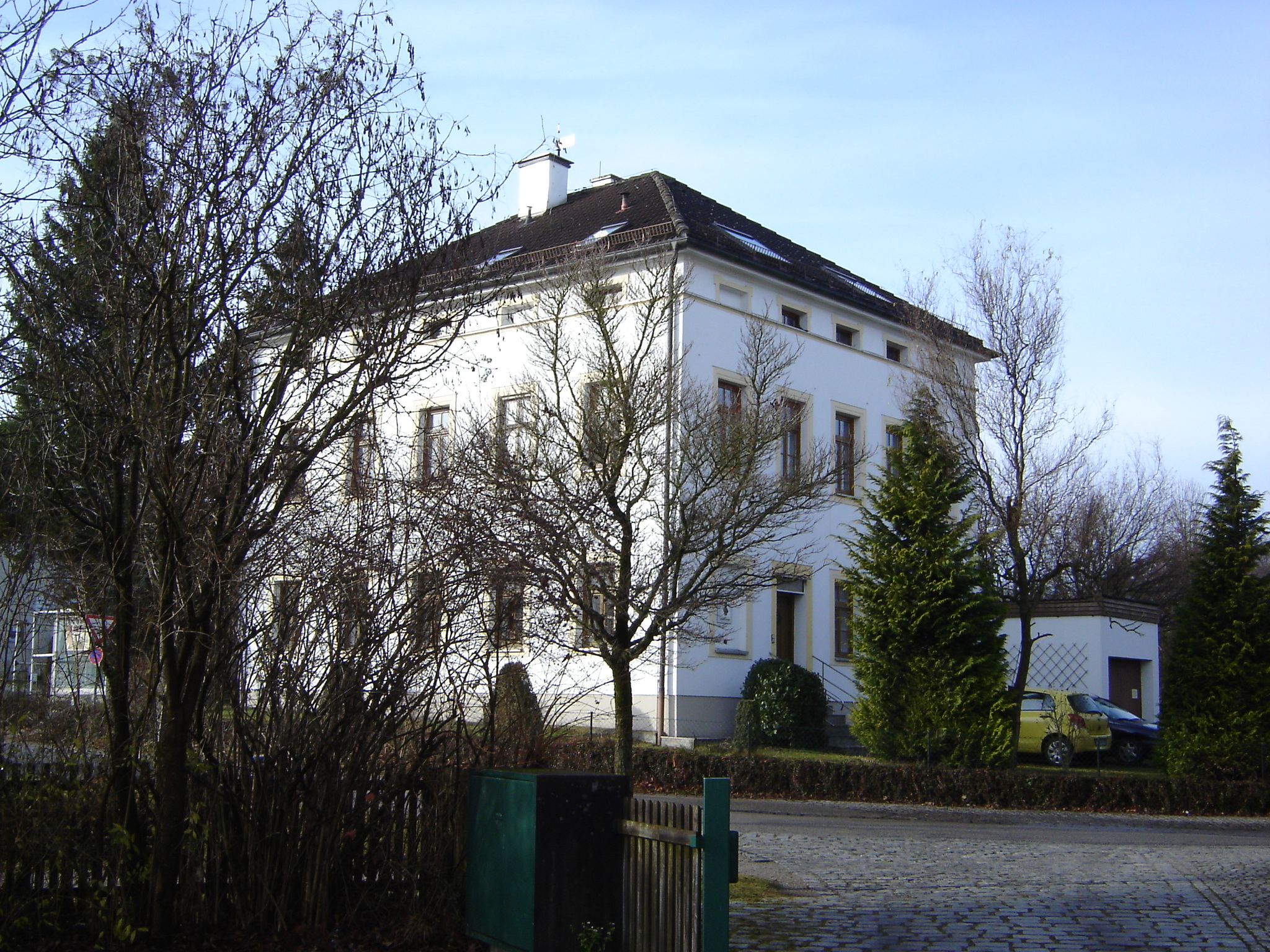 Das alte Schulhaus in Puchheim-Ort wird oft noch "Poschegar-Haus" genannt.